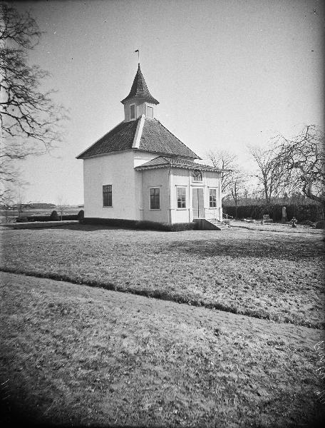 Kapellet från nordväst. Kategori: (01) ExteriörerKapellet från nordväst.